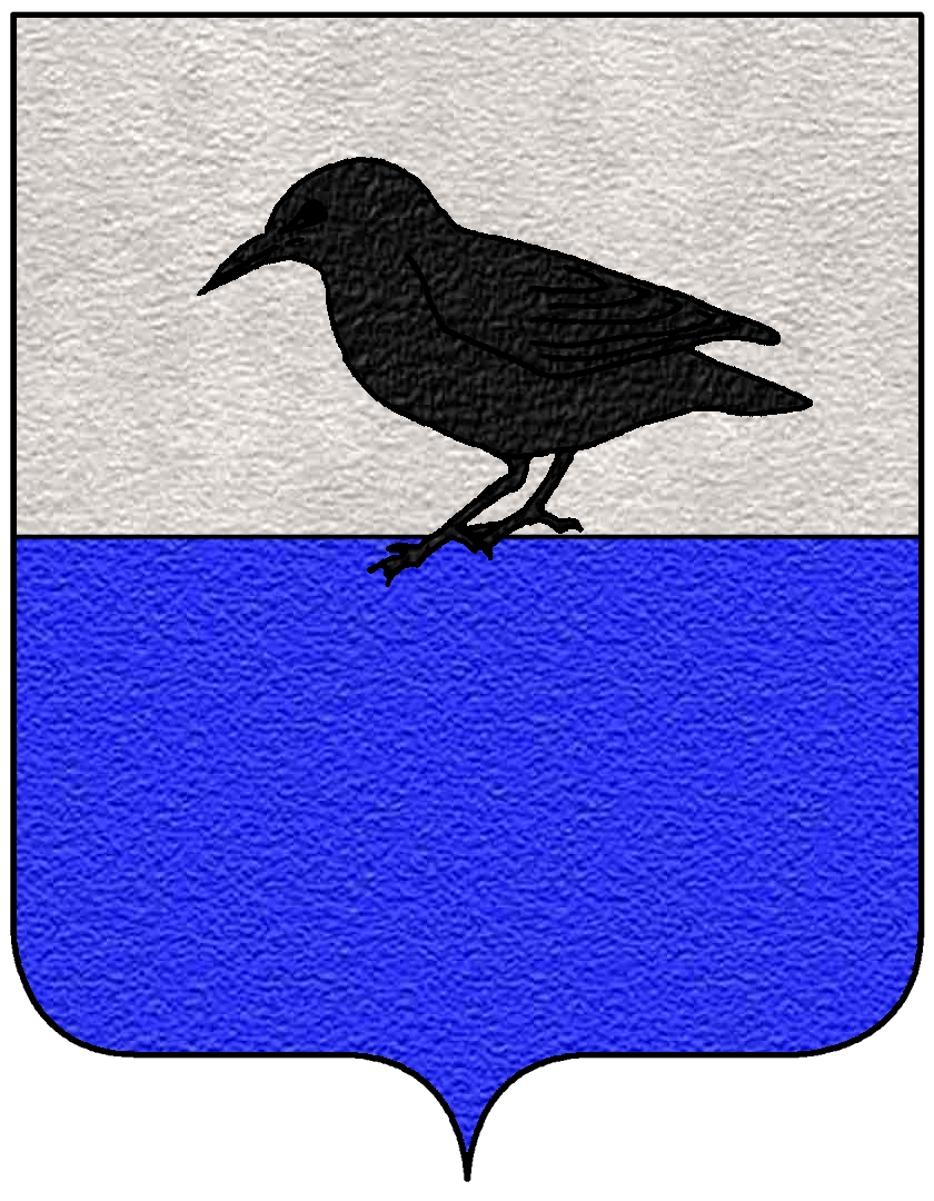 Stemma della famiglia Storladi, appartenente al patriziato di Venezia.